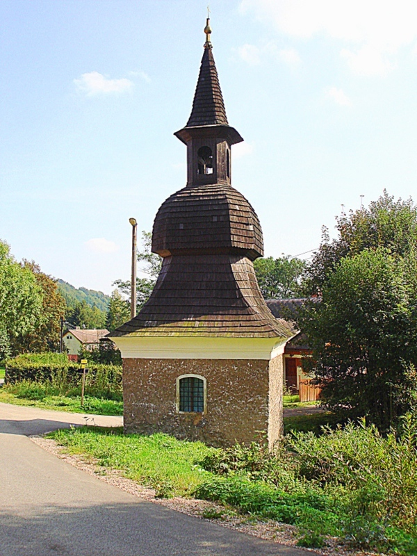 Zaclerz,Drewniana Dolina (Prkenny Dul), kapliczka